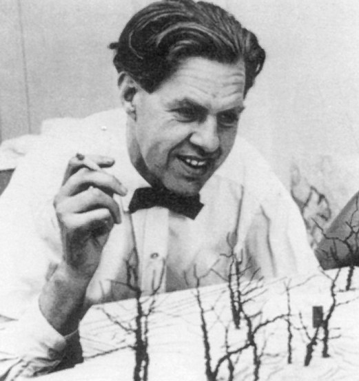 Arkitekt Erik Glemme (1905-1959)